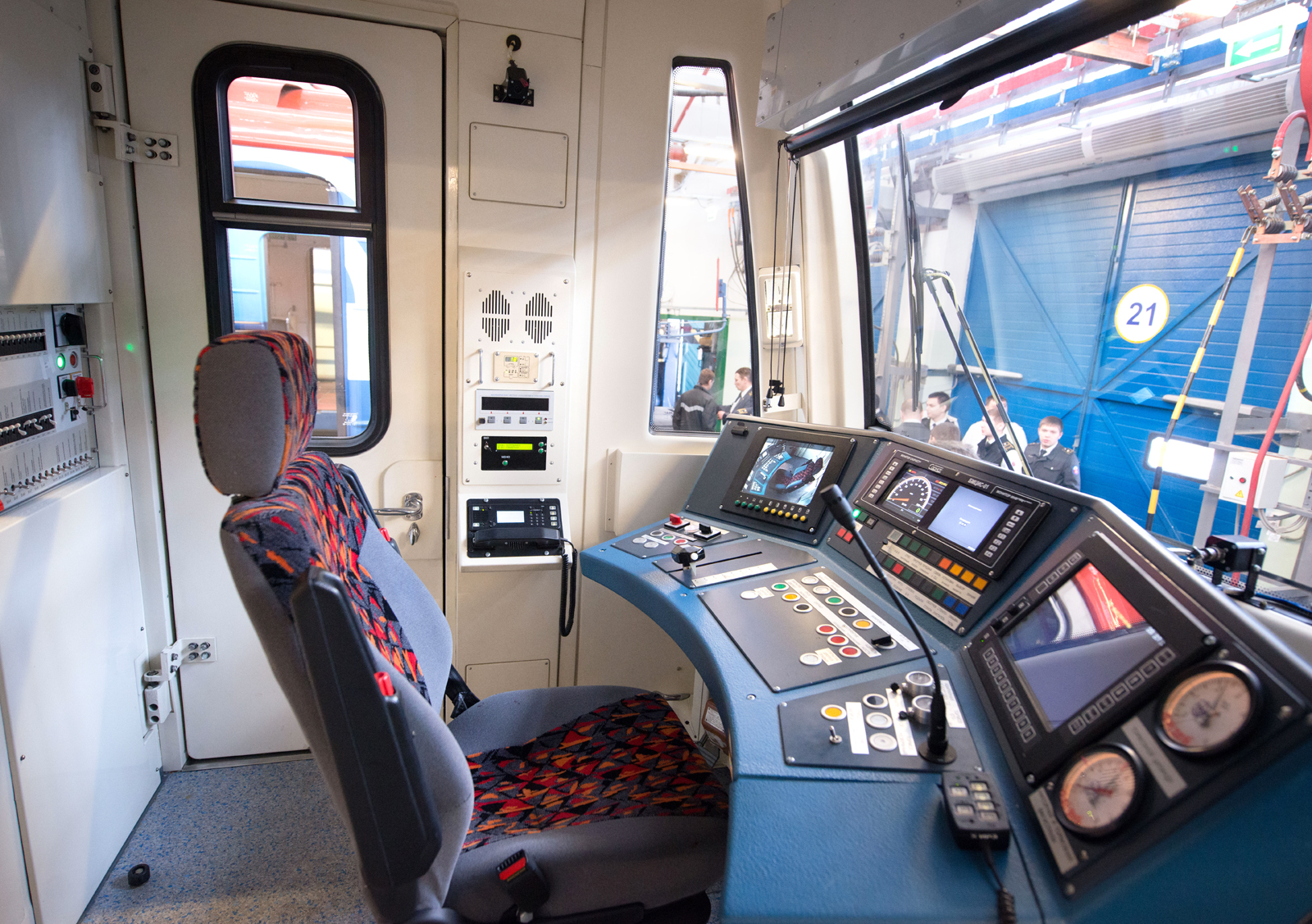 Интерьер кабины машиниста вагона 81-760А